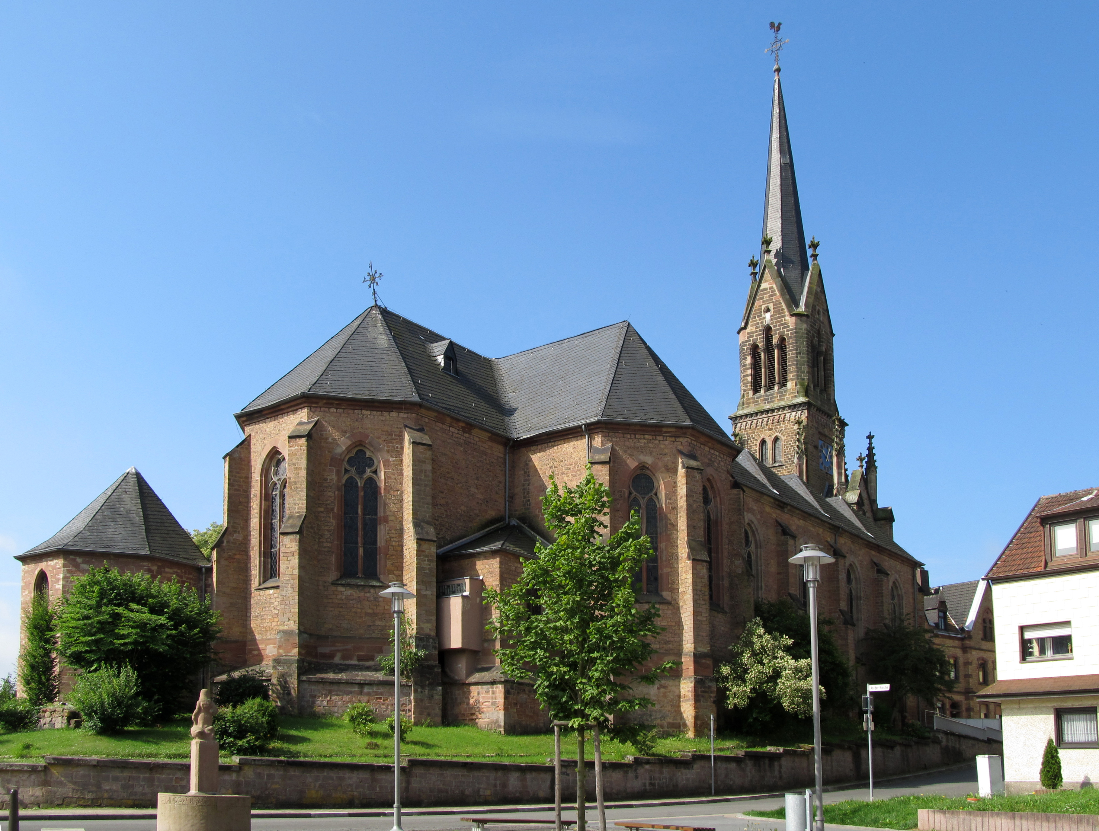 Die katholische Pfarrkirche St. Ludwig in Spiesen, Saarland